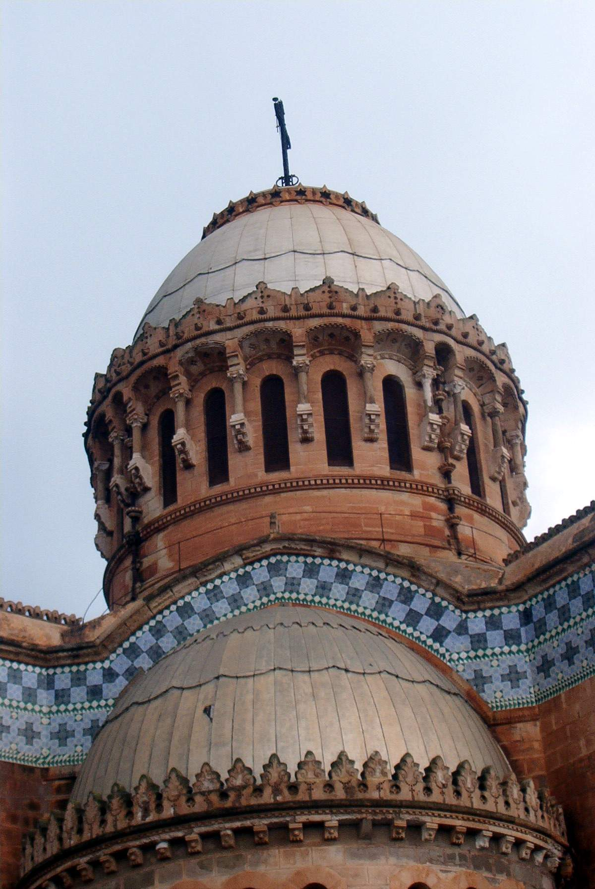 dôme de la cathédrale de Notre Dame d'Afrique à Alger